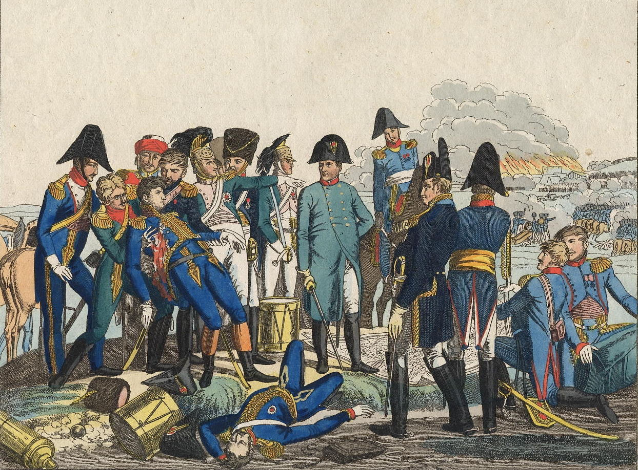 Napoleon und der tödlich verwundete Grossmarschall Duroc, Herzog von Friaul.